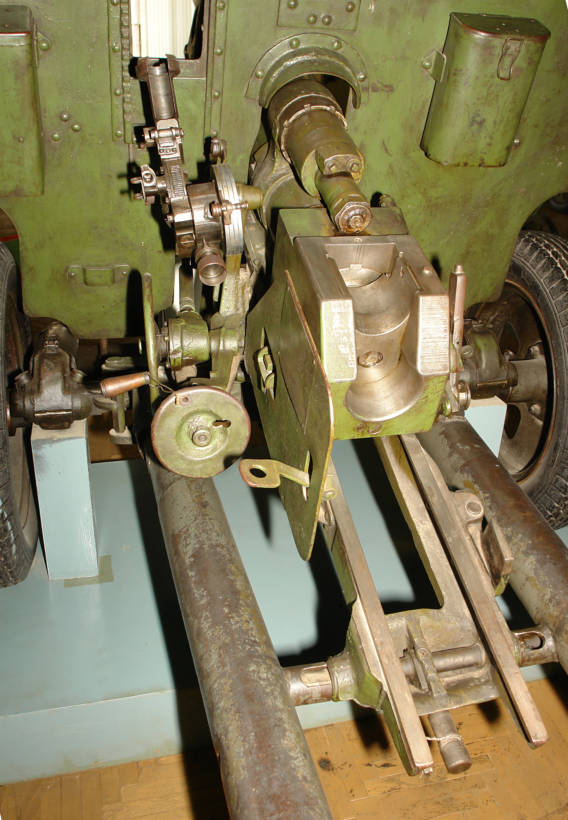 76-мм ПУШКА обр. 1942 г. № 1079 КОМАНДИР ОРУДИЯ ГВАРДИИ СТАРШИЙ СЕРЖАНТ И. М. МАЛМЫГИН. Героический расчет этого орудия во главе с коммунистом гвардии старшим сержантом И. М. Малмыгиным начал свой боевой путь на Северо-Западом фронте. Затем громил врага на крайне, в Молдавии, Румынии, Югославии, Венгрии, Берлине. Уничтожил 5 танков, 12 орудий, 27 пулеметов, до 200 гитлеровцев.